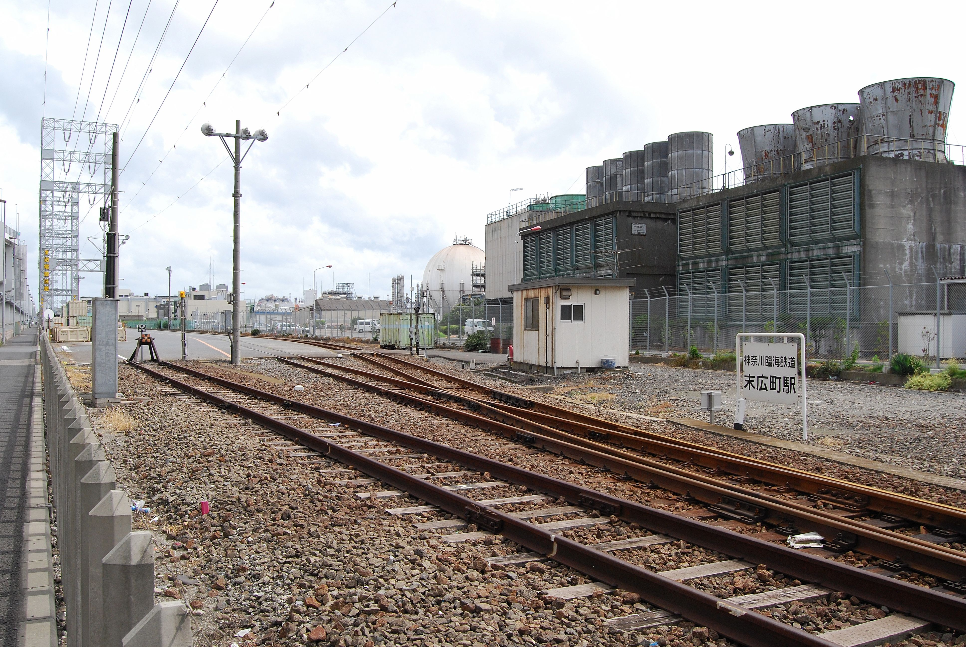 川崎臨海鉄道浮島線、末広町駅構内